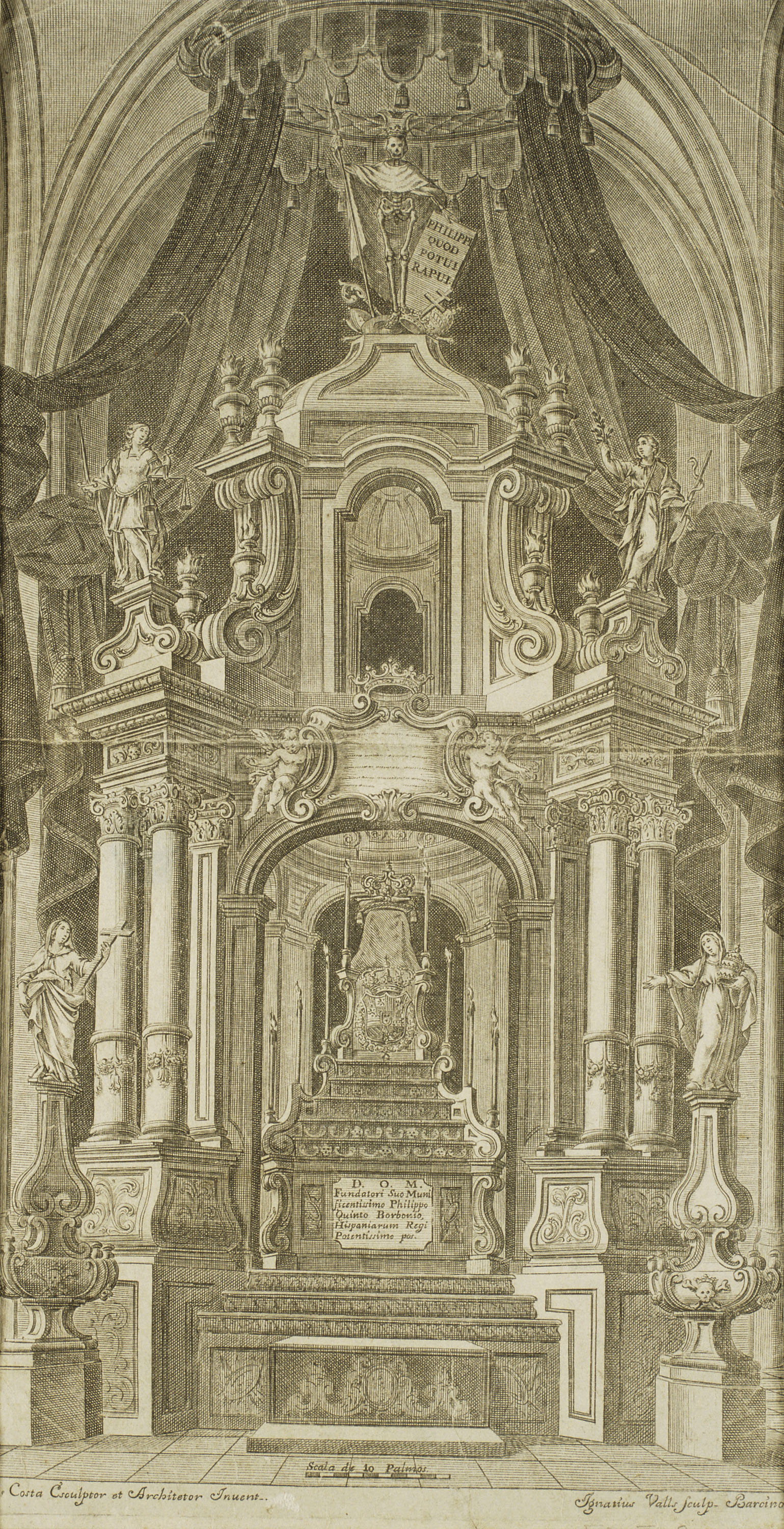 Túmul de Felip V de la Universitat de Cervera (1746), obra de Pere Costa.Publicat a "Relacion que hace el claustro de la Real y Pontificia Universidad de Cervera a la S.C.R. magestad de el rey nuestro señor don Fernando Sexto, que Dios guarde, de las reales exequias, que el dia 8. de octubre de 1746 consagró a la eterna memoria de su muy amado rey, y fundador don Phelipe Quinto, que de Dios goza" impressa per Manuel Ibarra a Cervera, 1746